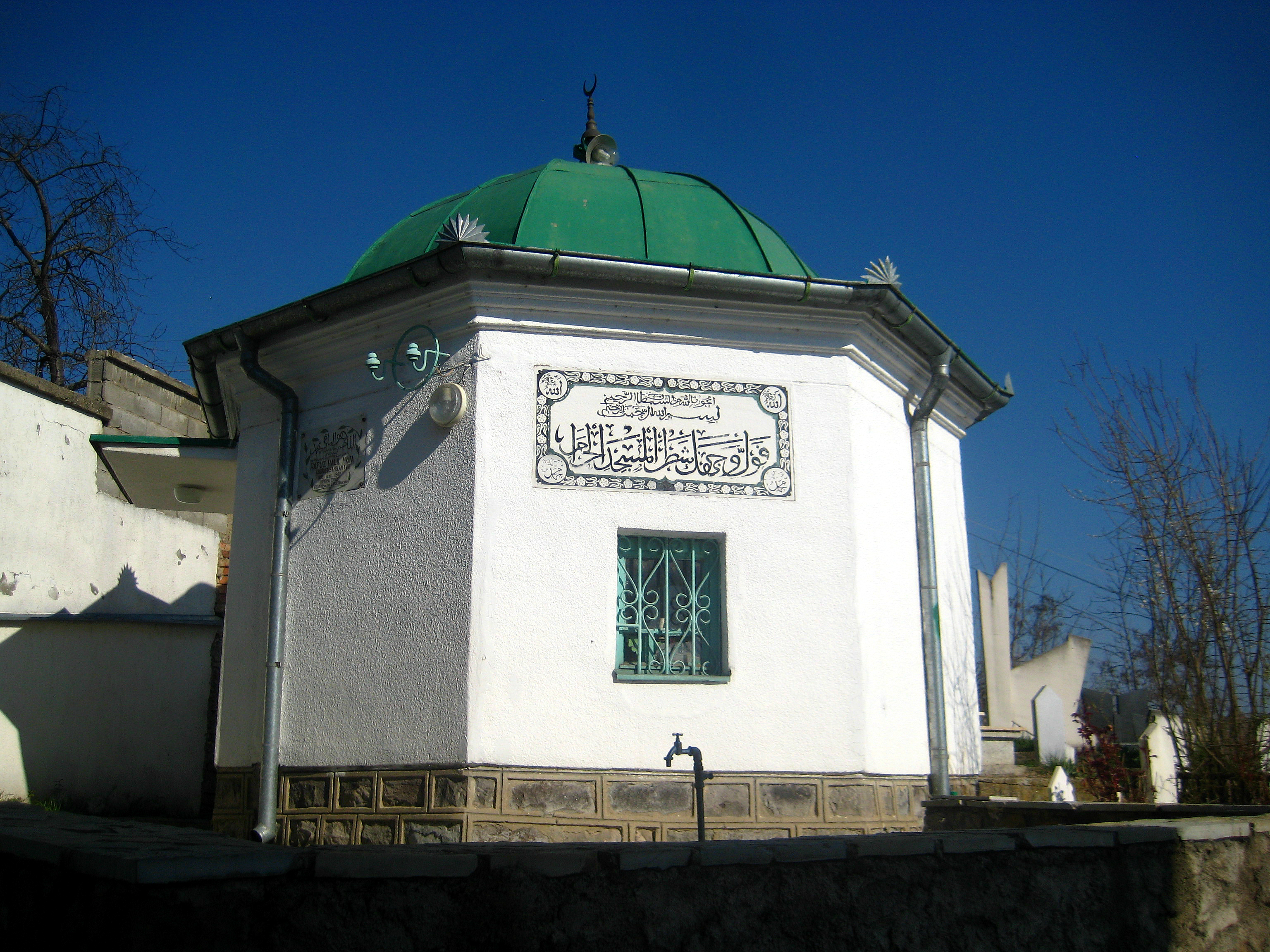 Teqja e Hafuz Halil Mripës